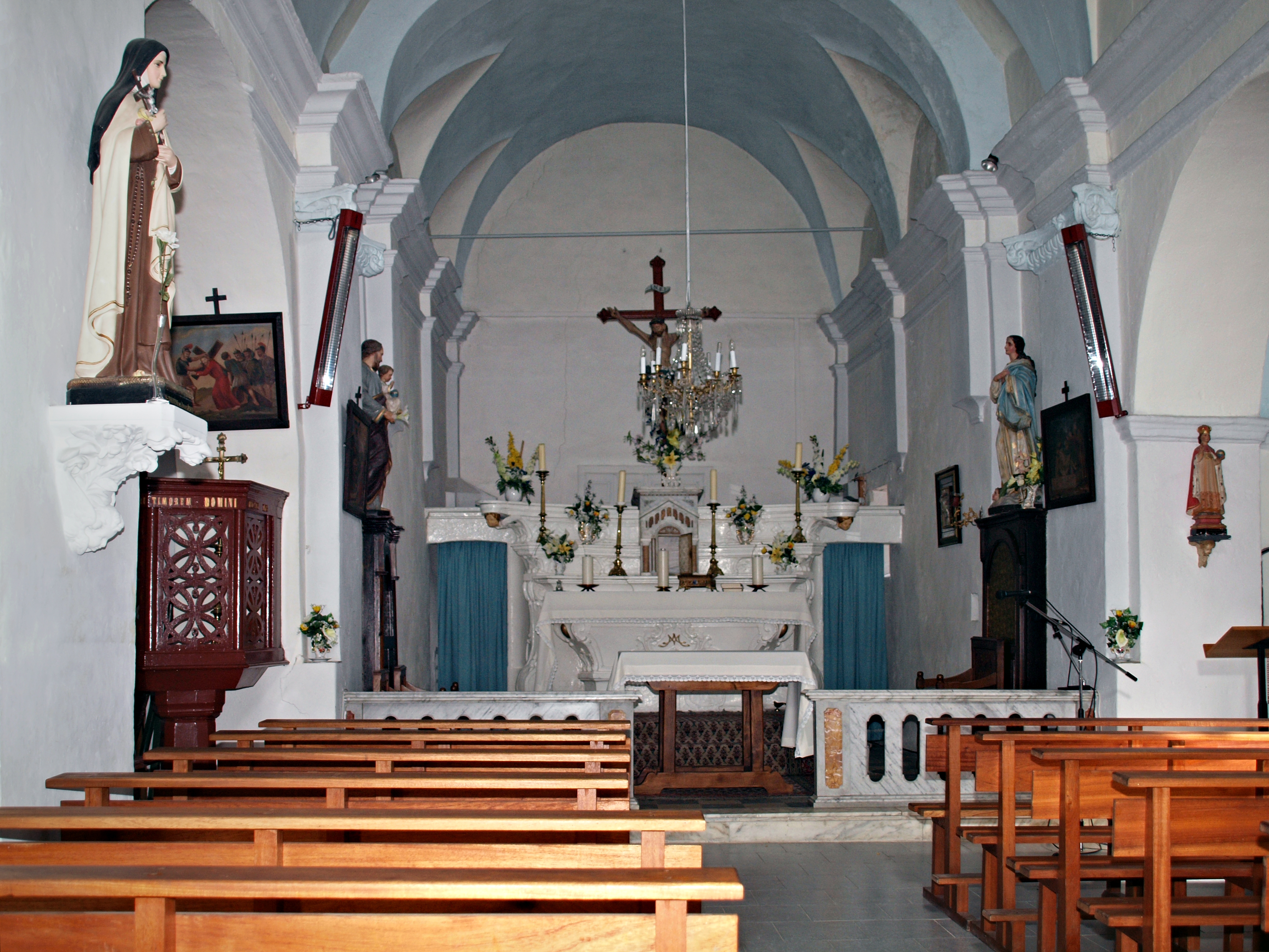 Rusio, Casaluna (Corse) - Intérieur de l'église Sainte-Marie (Santa Maria Assunta)